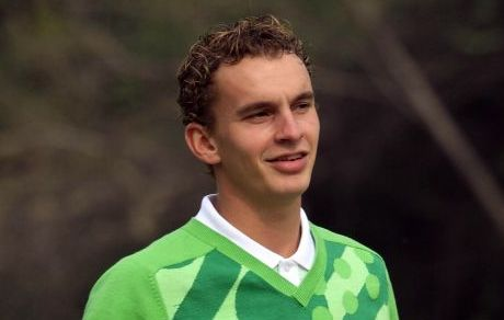 Joost Luiten in Indonesie, 2008